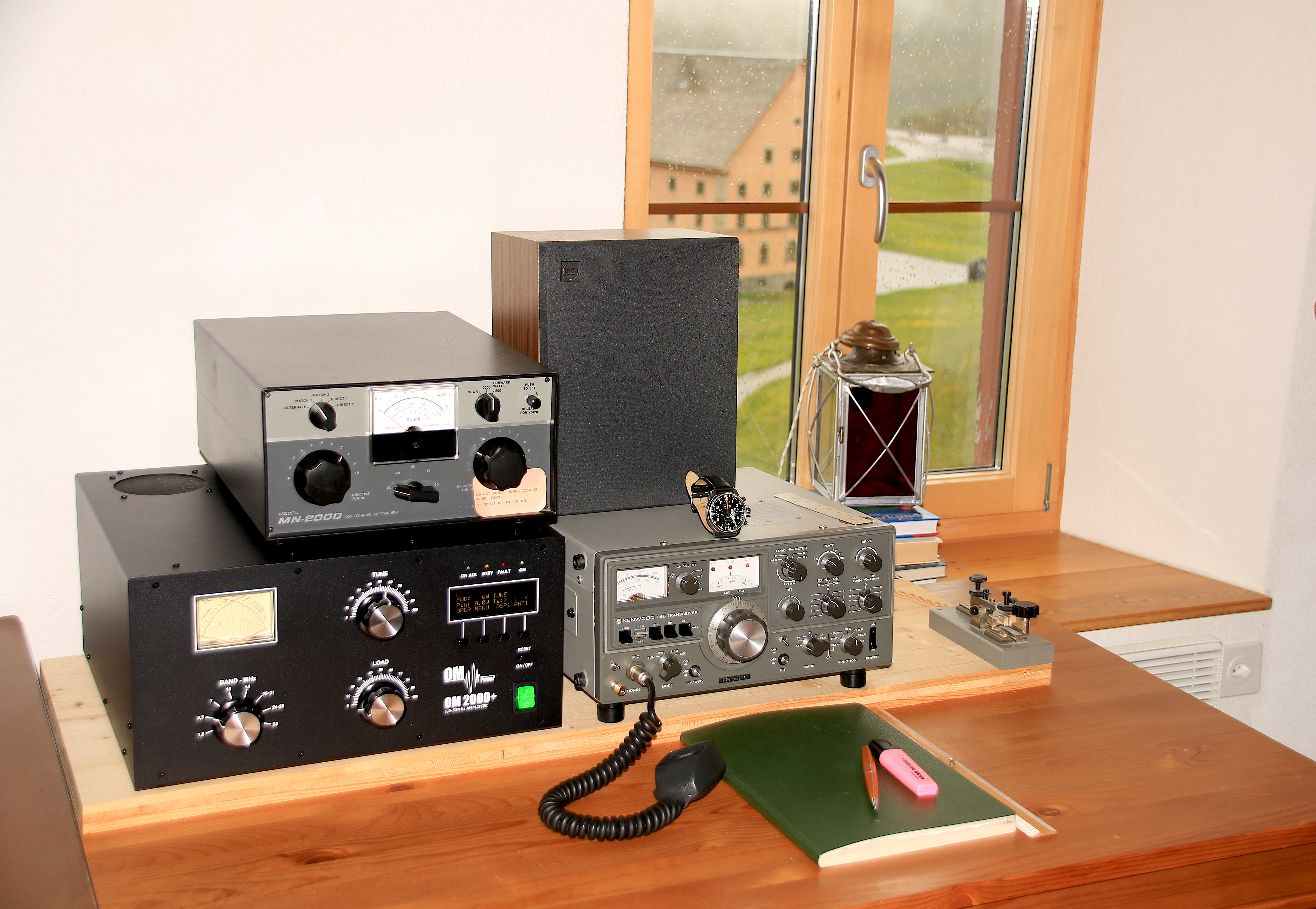 Linearendverstärker OM2000+